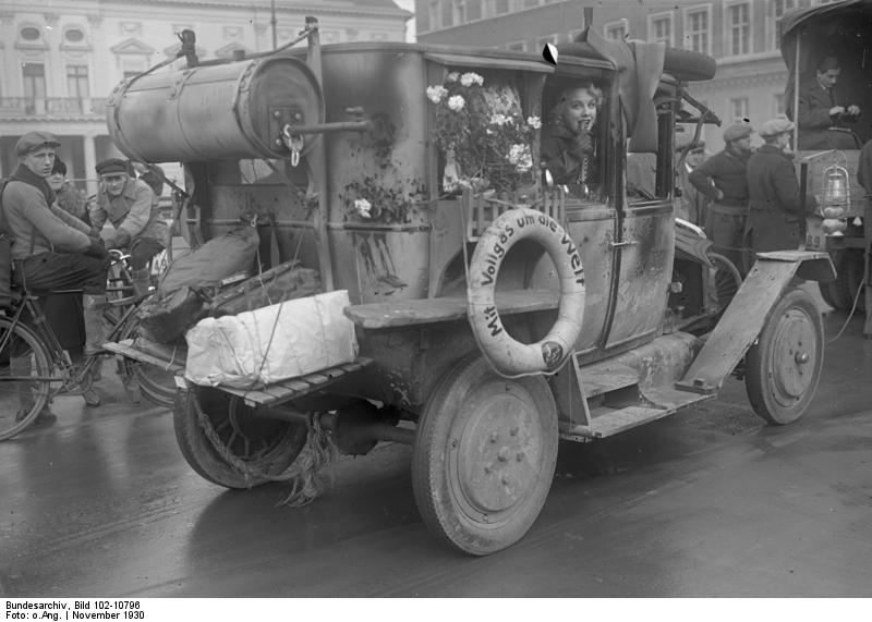 Wie eine Filmschauspielerin Reklame macht ! Entgegengesetzt zu ihren berühmten Kolleginnen, welche fast ausnahmslos Luxus-Automobile ihr eigen nennen, zog die Berliner Filmschauspielerin Anny Ondra mit einem vorsintflutlichen Automobil durch die Strassen Berlins. Kochtöpfe und Blumenbretter an dem Wagen und andere Utensilien gaben demselben ein originelles Aussehen und wurde von dem Berliner viel belacht.